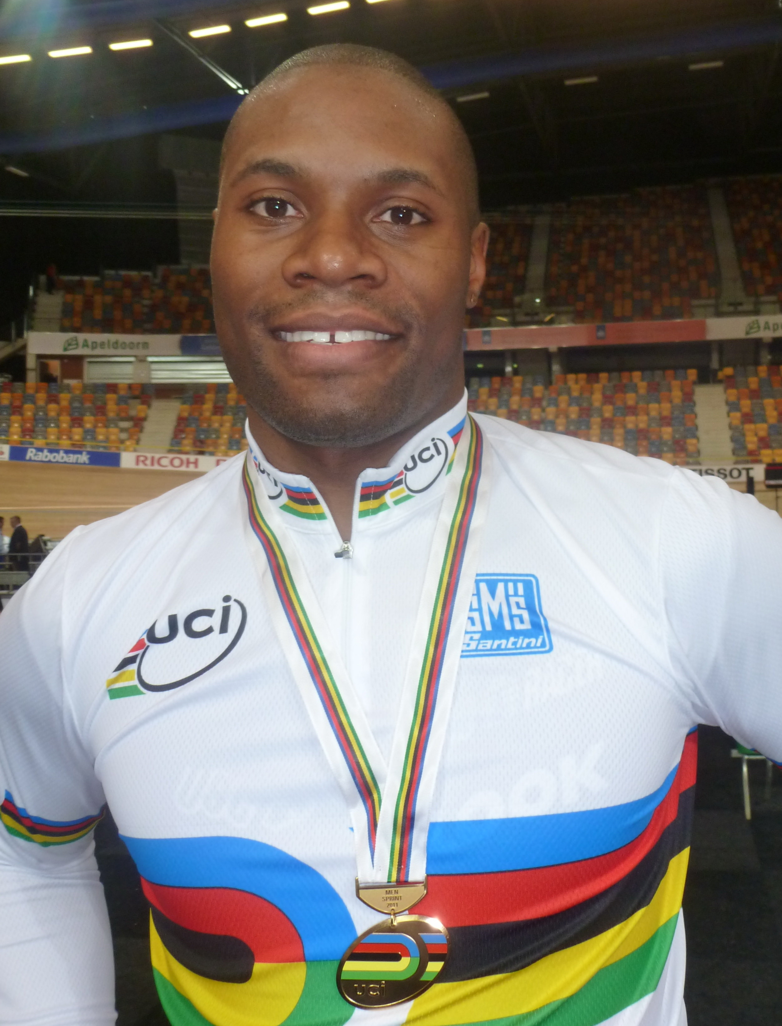 Grégory Baugé, französischer Radrennfahrer